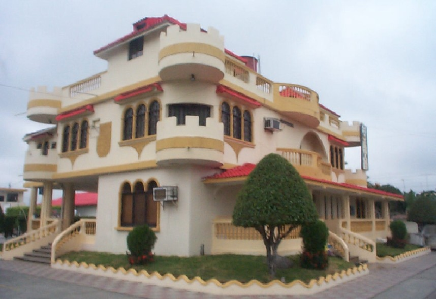 uNIVERSIDAD UNIANDES DE BABAHOYO